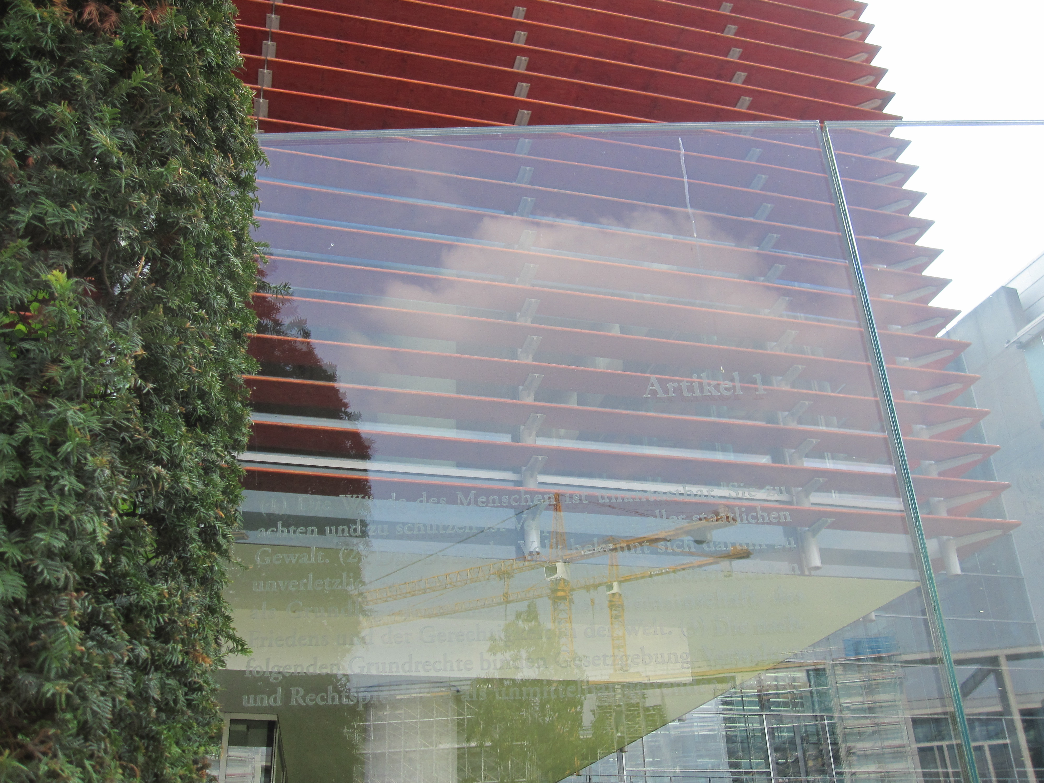 Bundestagsgebäude in Berlin: Der israelische Künstler Dani Karavan hat in drei Meter hohe Glasscheiben, die einen Außenhof des Jakob-Kaiser-Hauses im Uferbereich zu Spree begrenzen, die 19 Grundrechtsartikel des Grundgesetzes mit Laser eingraviert. „Die Grundrechtsartikel schweben gleichsam in Augenhöhe vor dem Haus der Fraktionen, dem Jakob-Kaiser-Haus“ (Andreas Kaernbach, Deutscher Bundestag).